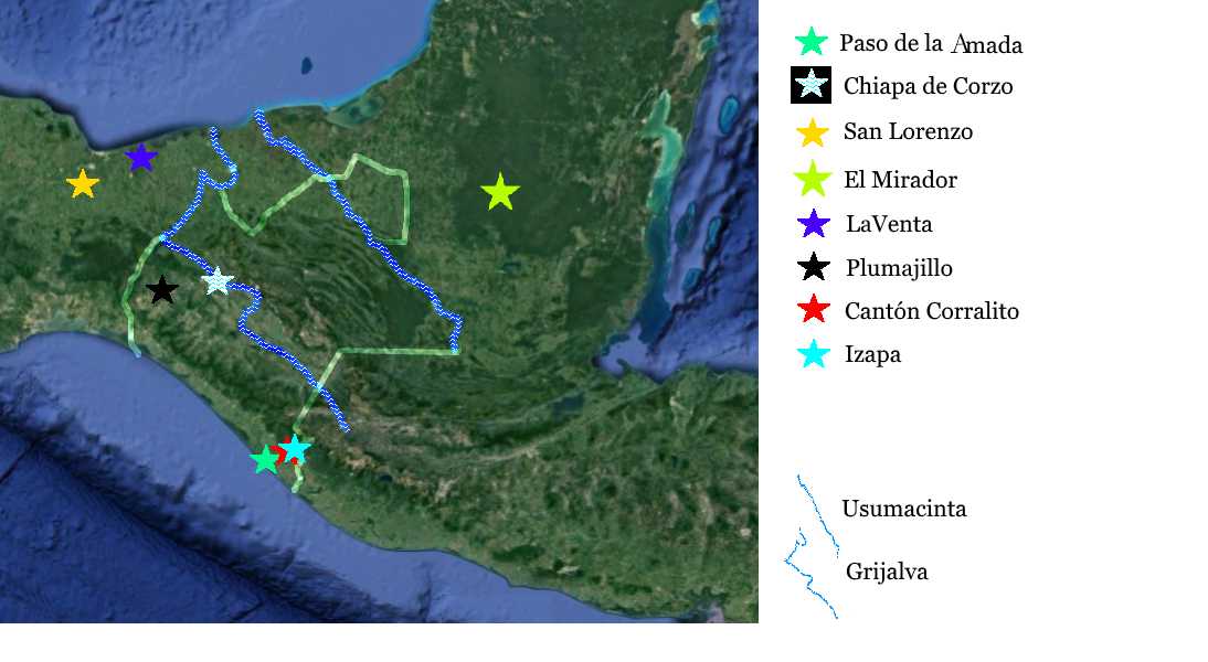 Algunos sitios preclásicos de Chiapas.